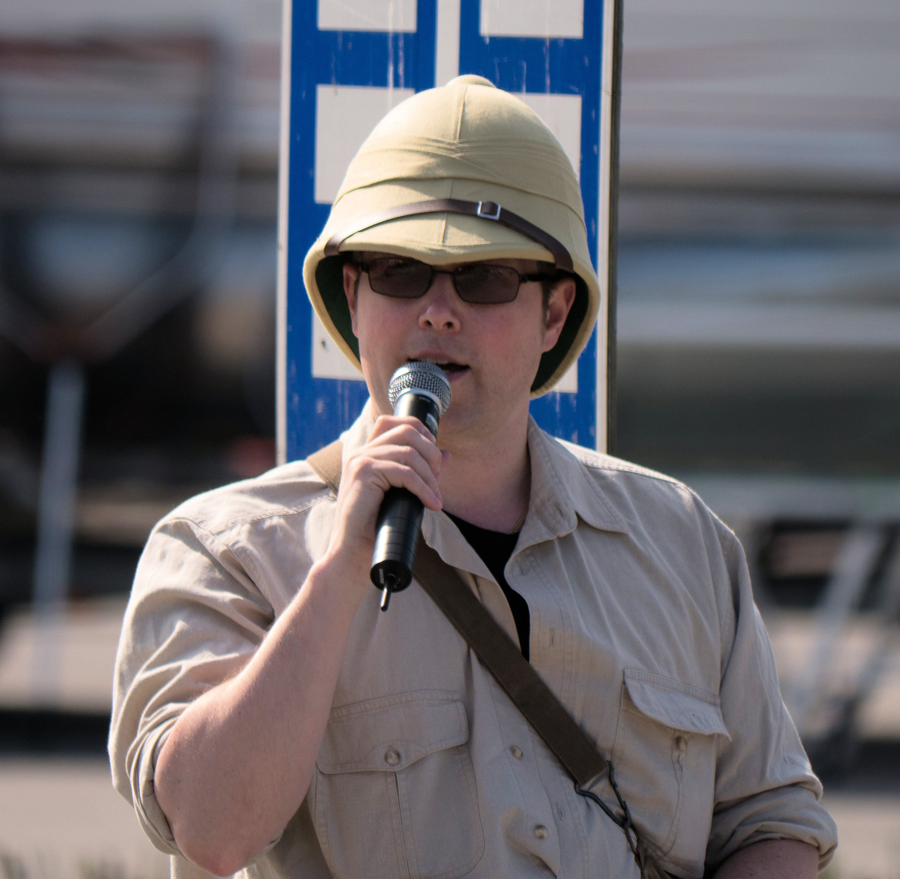 Ari lauanne suomalainen juontaja